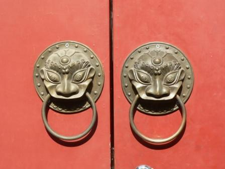 门钹 拍摄